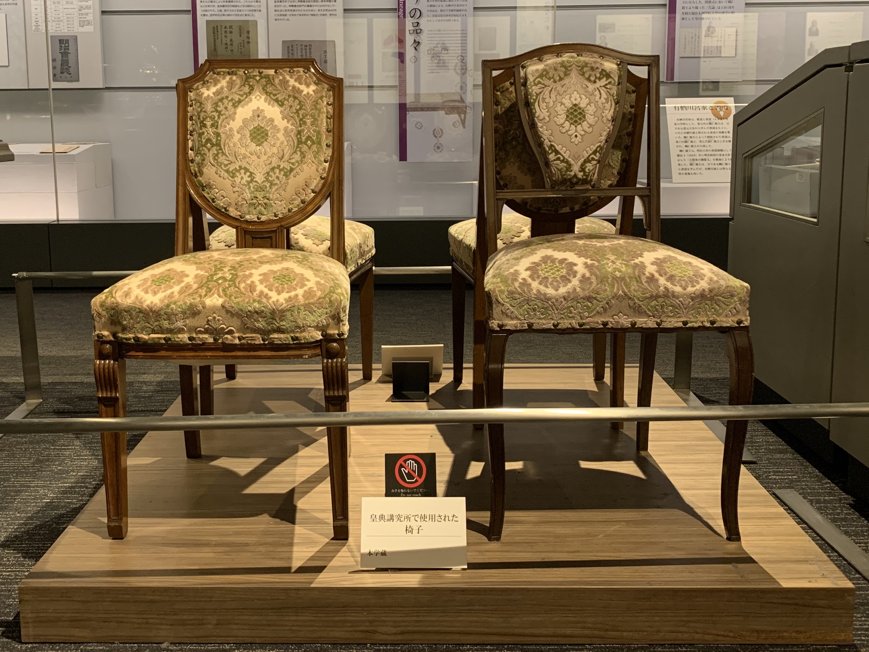 國學院大學博物館校史展示室に展示れている皇典講究所で使用された椅子の写真